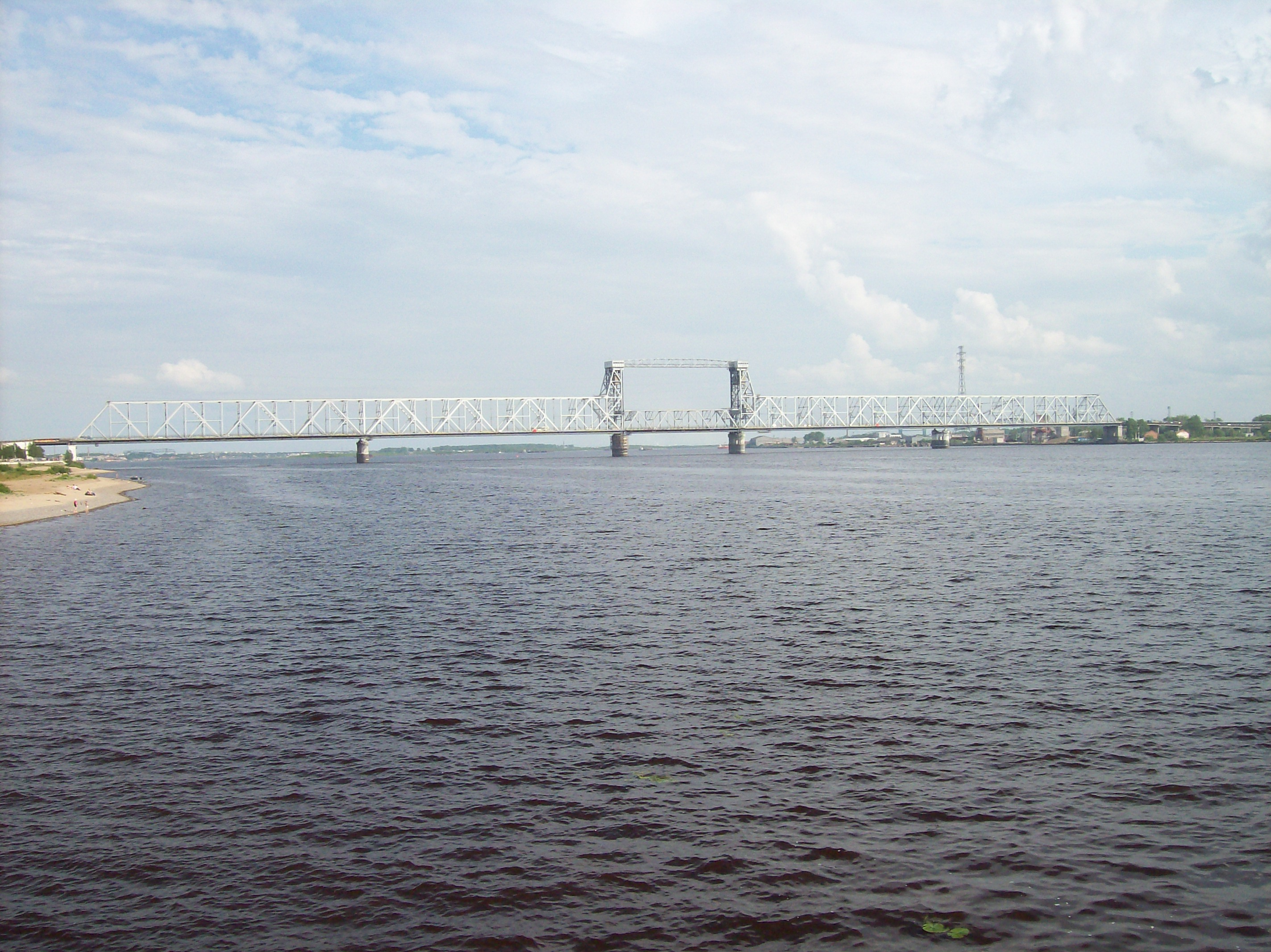 Мост через Северную Двину, Архангельск, июнь 2007